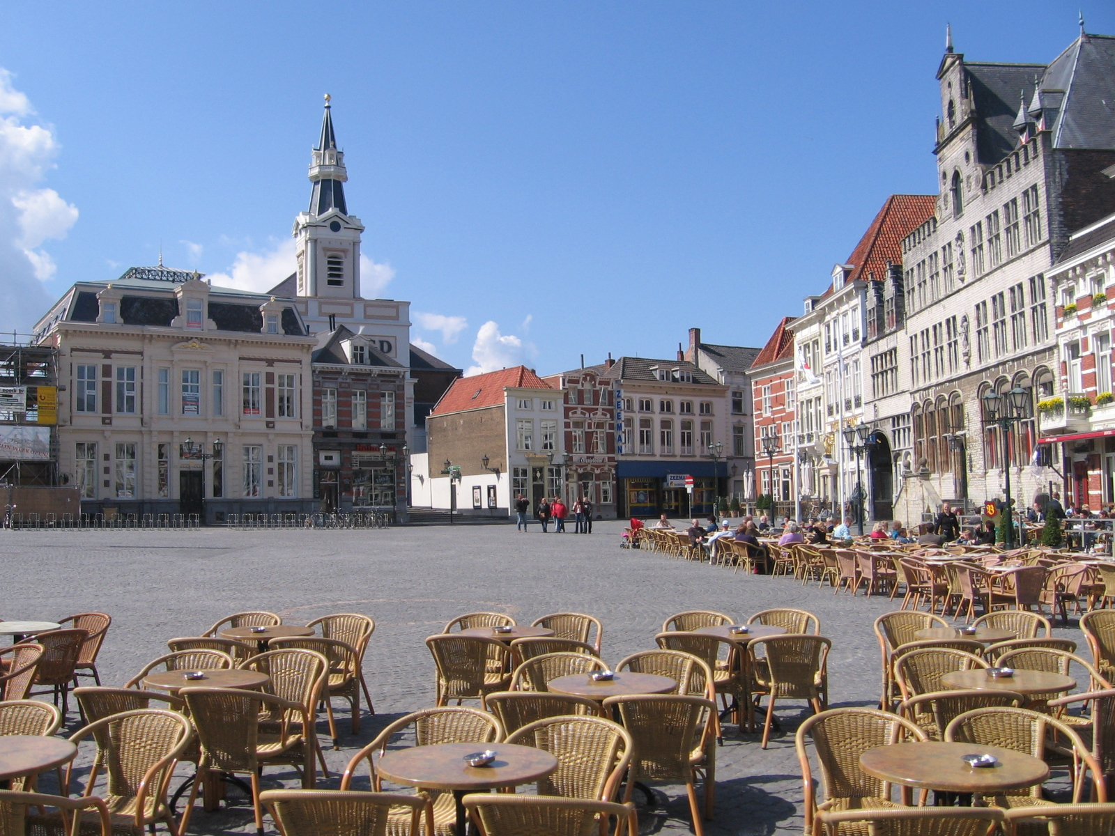 Bergen op Zoom, 17 april 2006